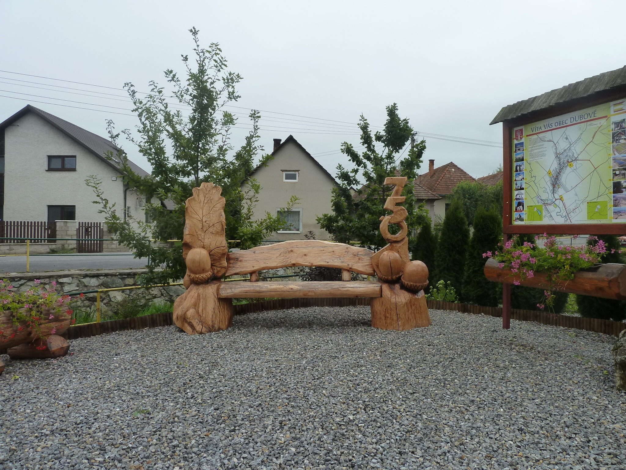 Park v obci Dubové